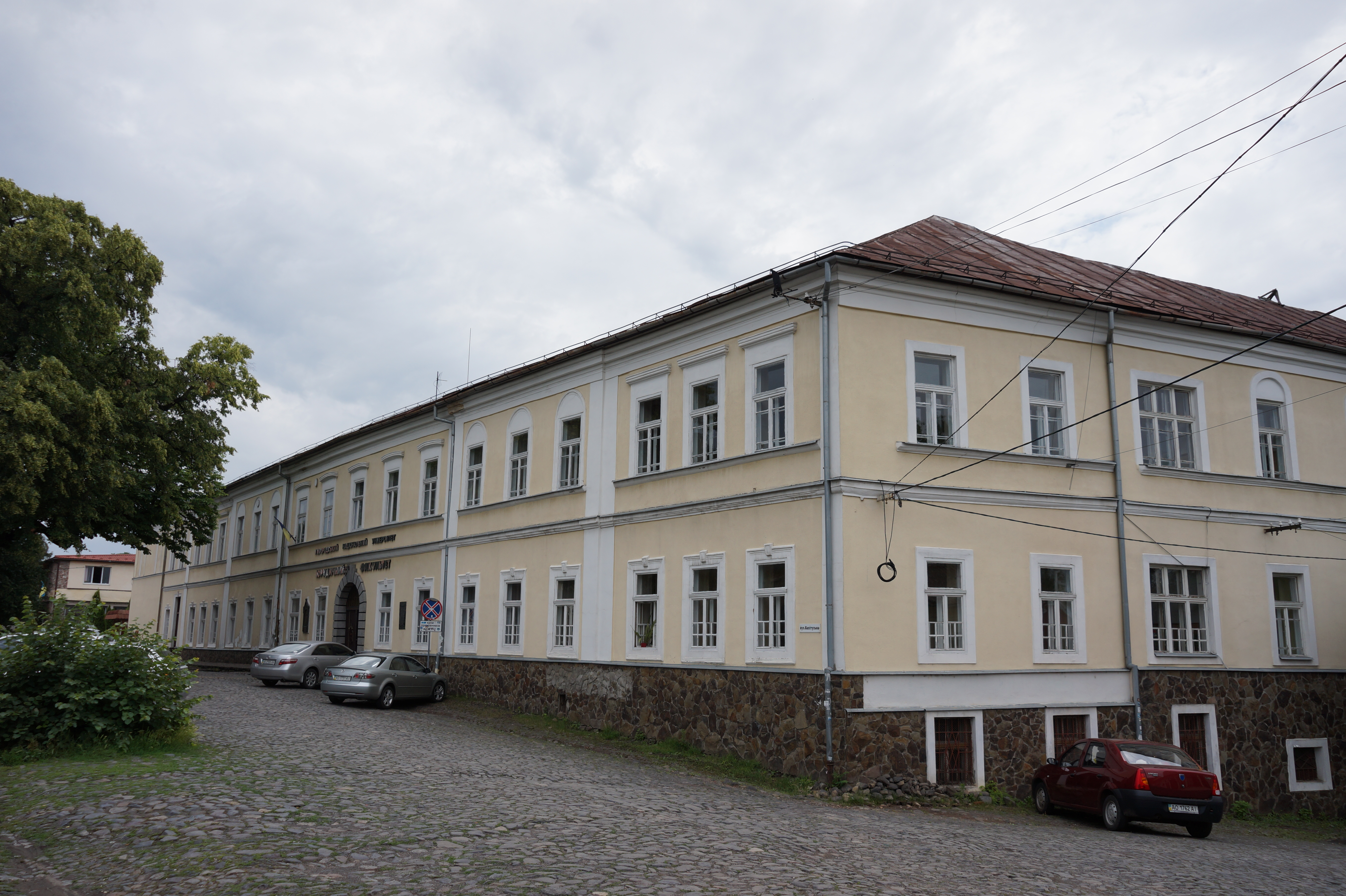 Будівля чоловічої греко-католицької семінарії, в якій викладав А. Волошин та вчився І. Мондок, Ужгород, вул. Капітульна, 26